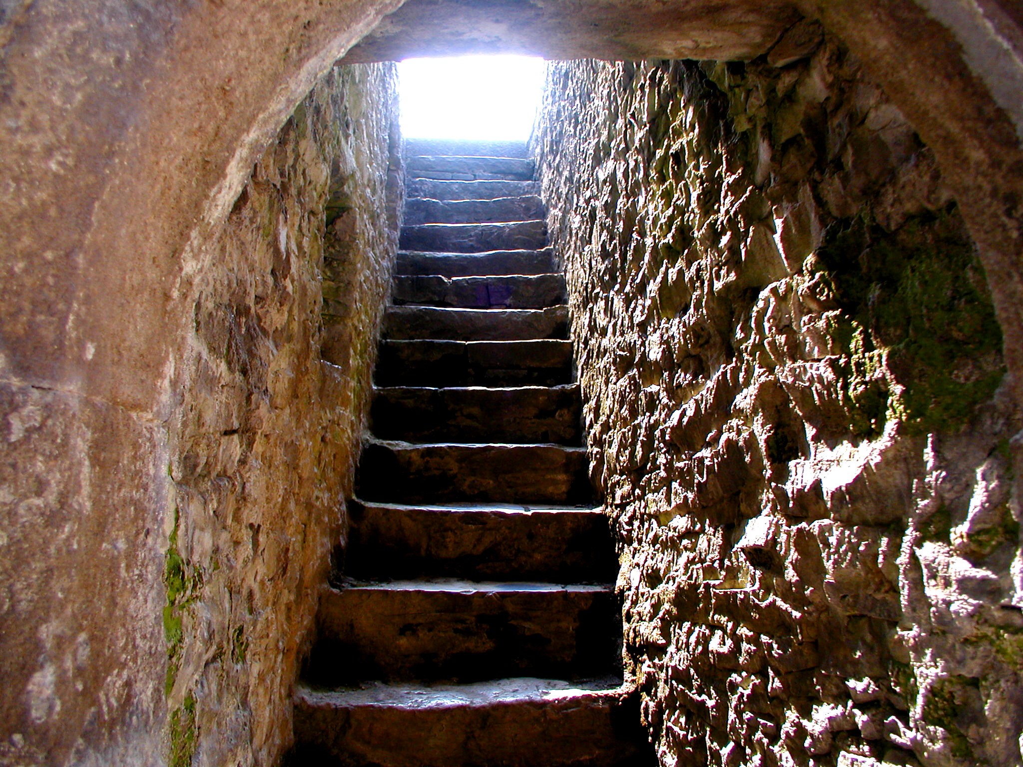 Cahir Castle corridor